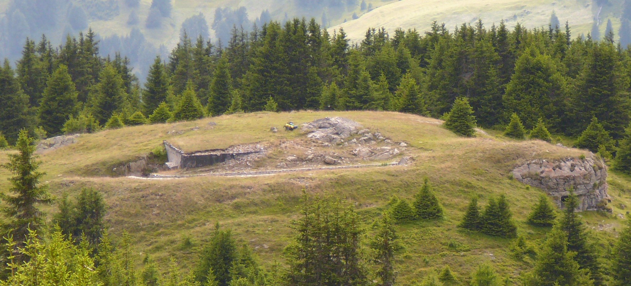 Pian dei morti, opera 3